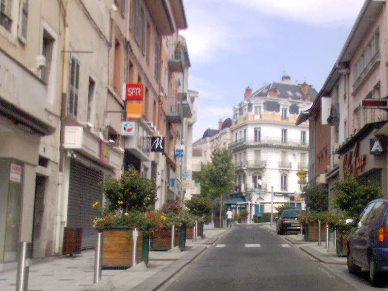 Centre-ville Oyonnax